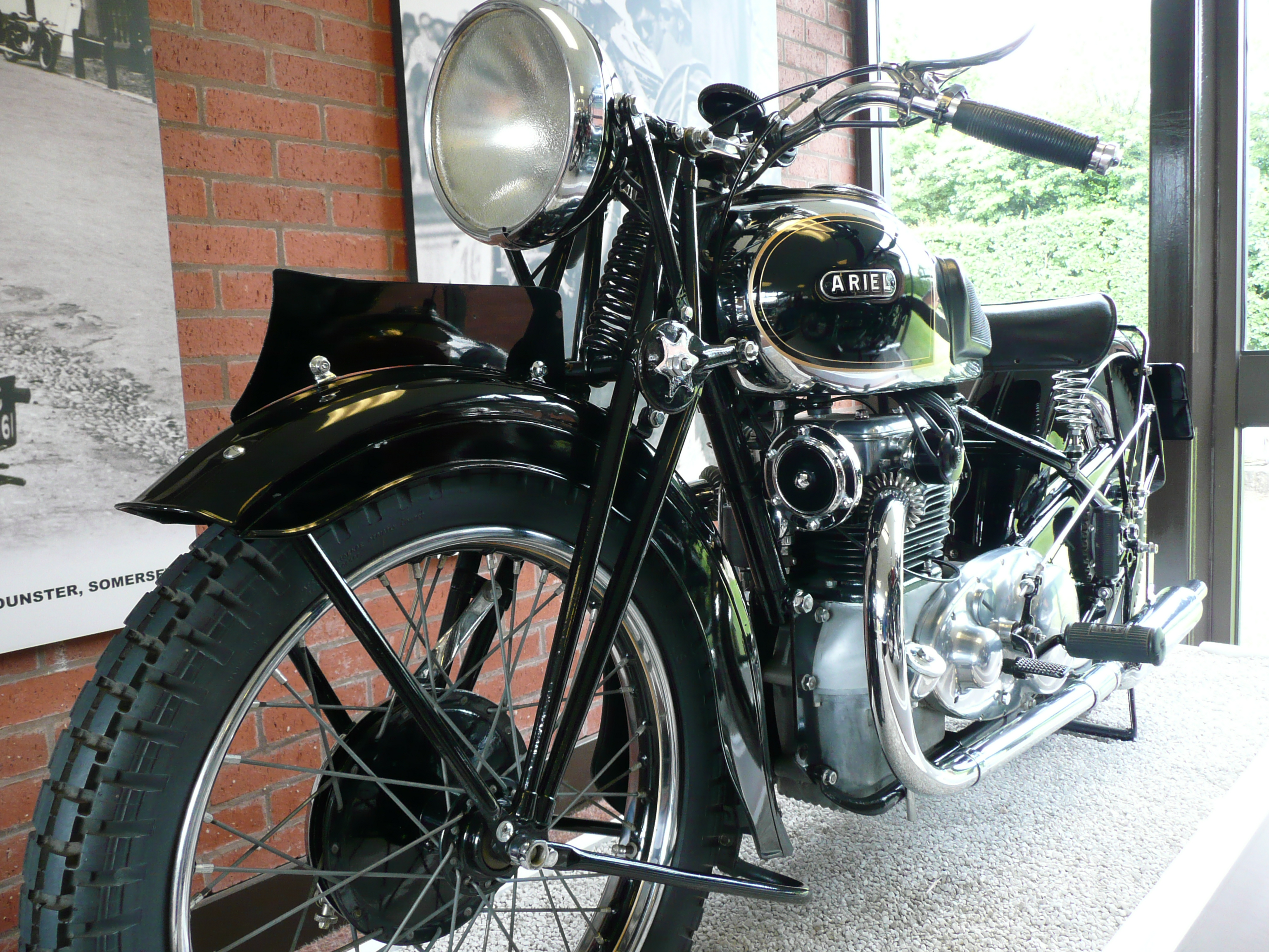 Ariel Square Four 600cc 1935